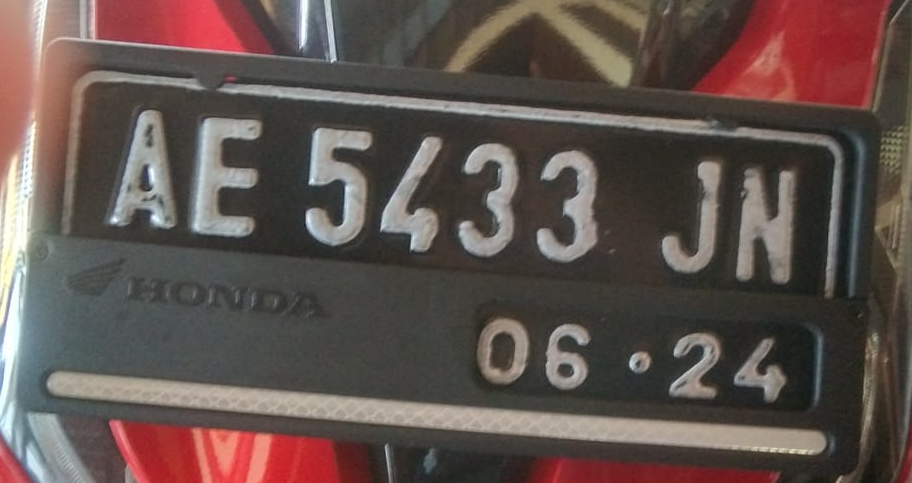 Plat AE Ngawi 2019